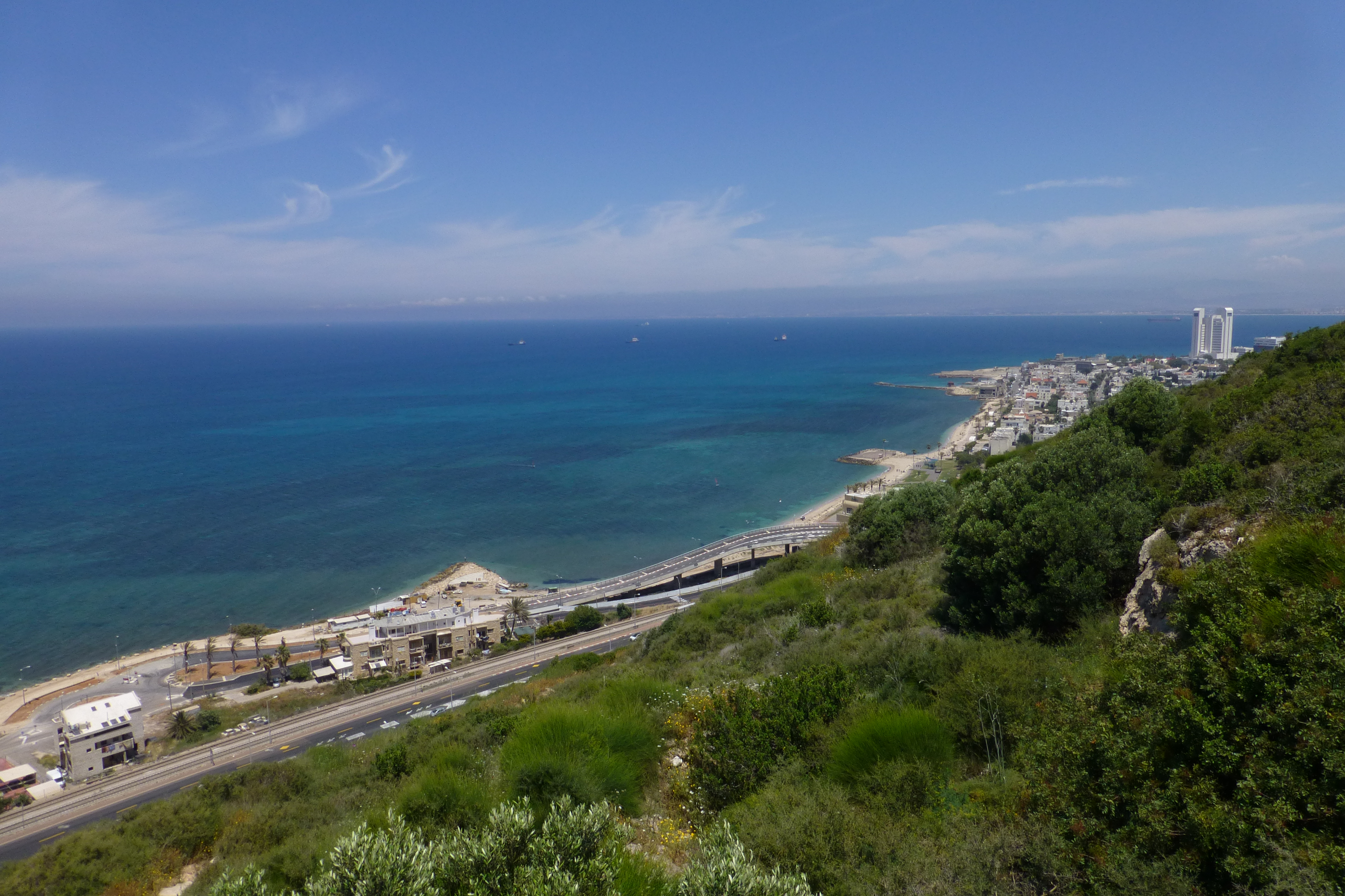 קזינו בת גלים היה מבנה בשכונת בת גלים בחיפה ששימש לפעילויות קהילה ופנאי משנות ה-30 של המאה ה-20, אך נהרס לאחר שנים, וכיום ניצב במקומו שלד בטון. חרף שמו, לא שימש המקום מעולם כקזינו.